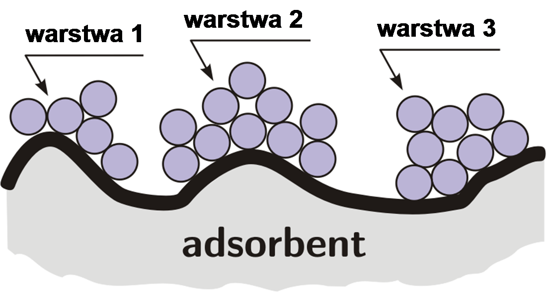 Model adsorpcji wielowarstwowej (wersja pl)